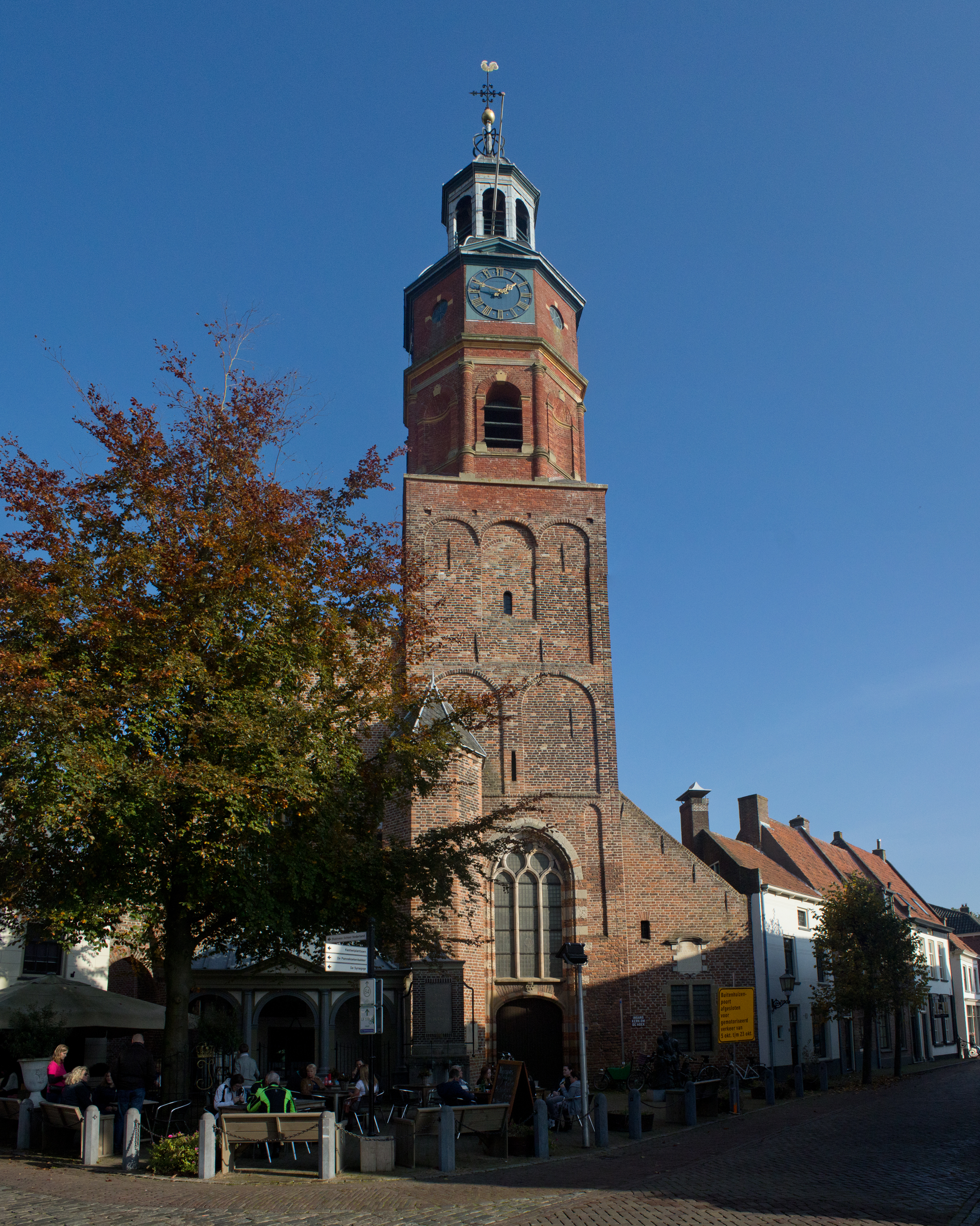 Kerktoren Sint-Lambertuskerk